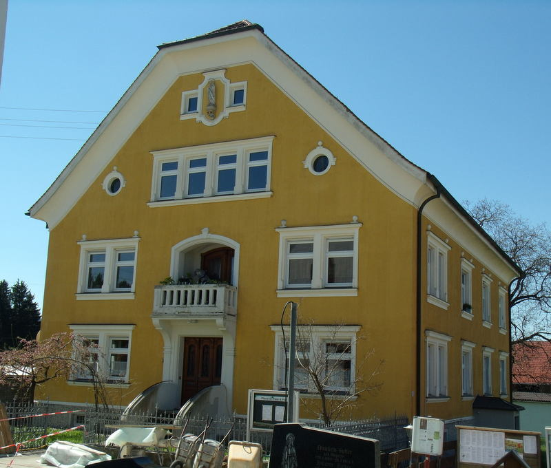 Sigmarszell